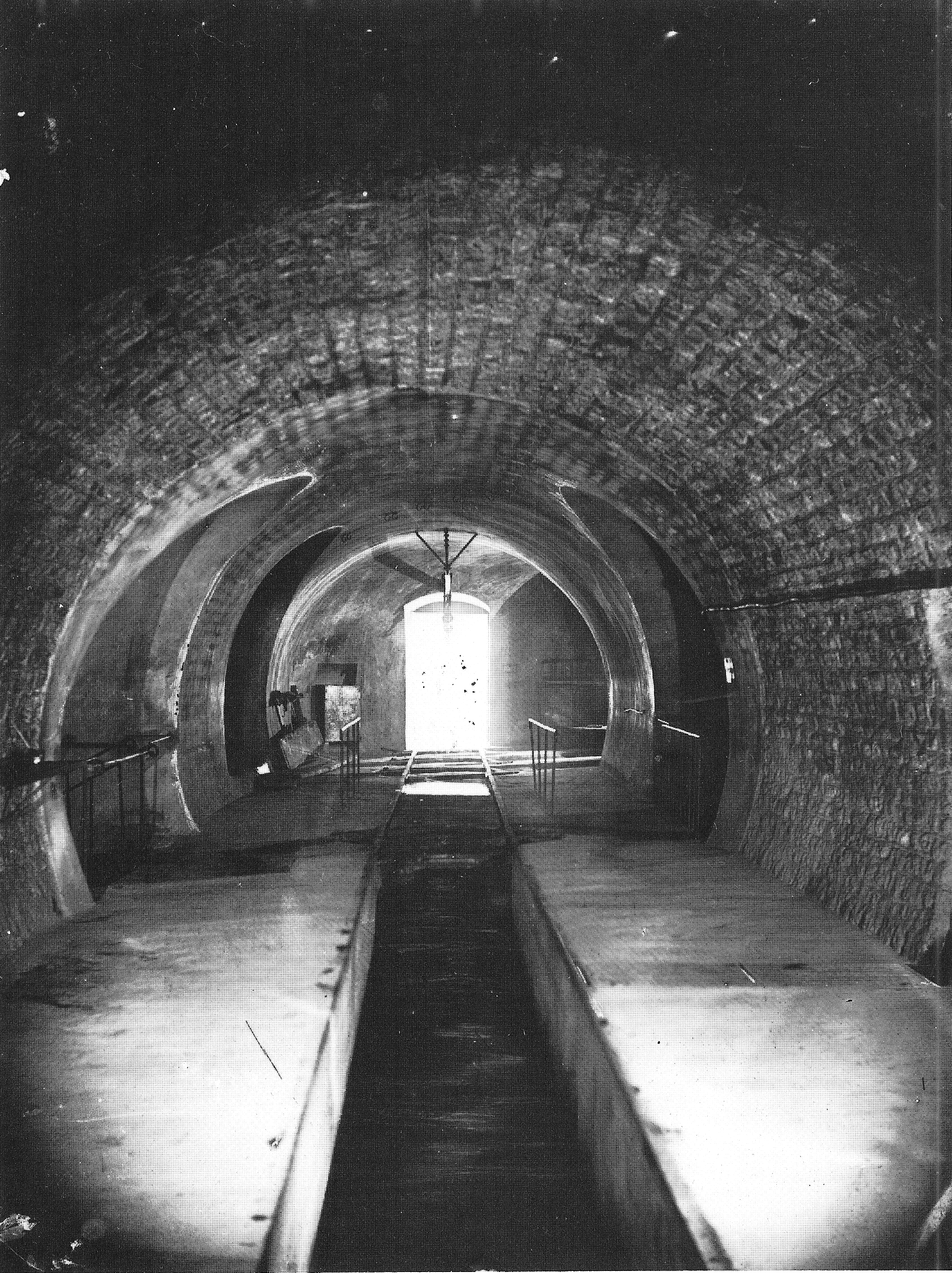 Égouts de Paris